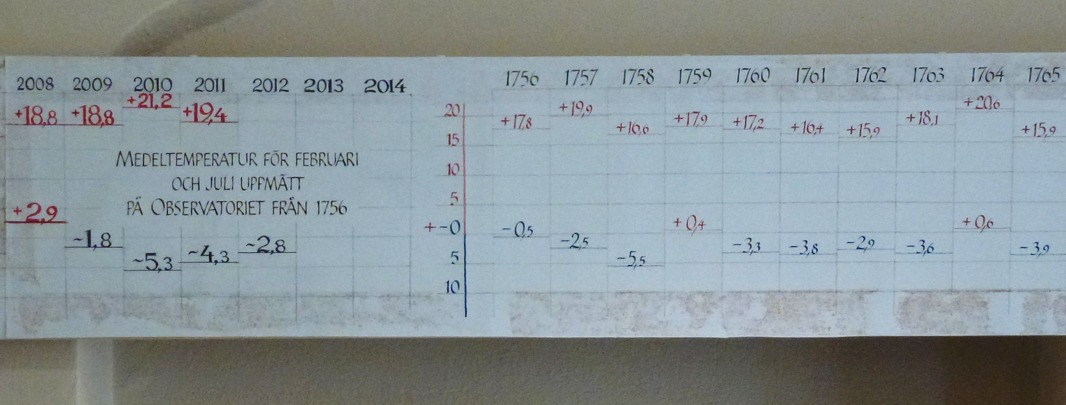 Temperaturslingan i väderkammaren, början och slutet